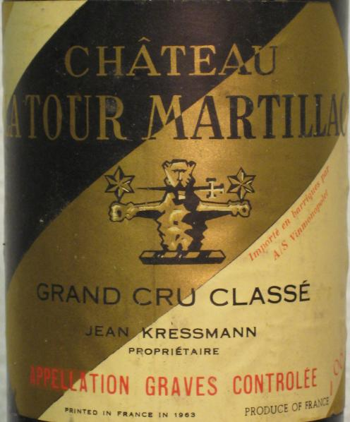 Château Latour Martillac 1962 label